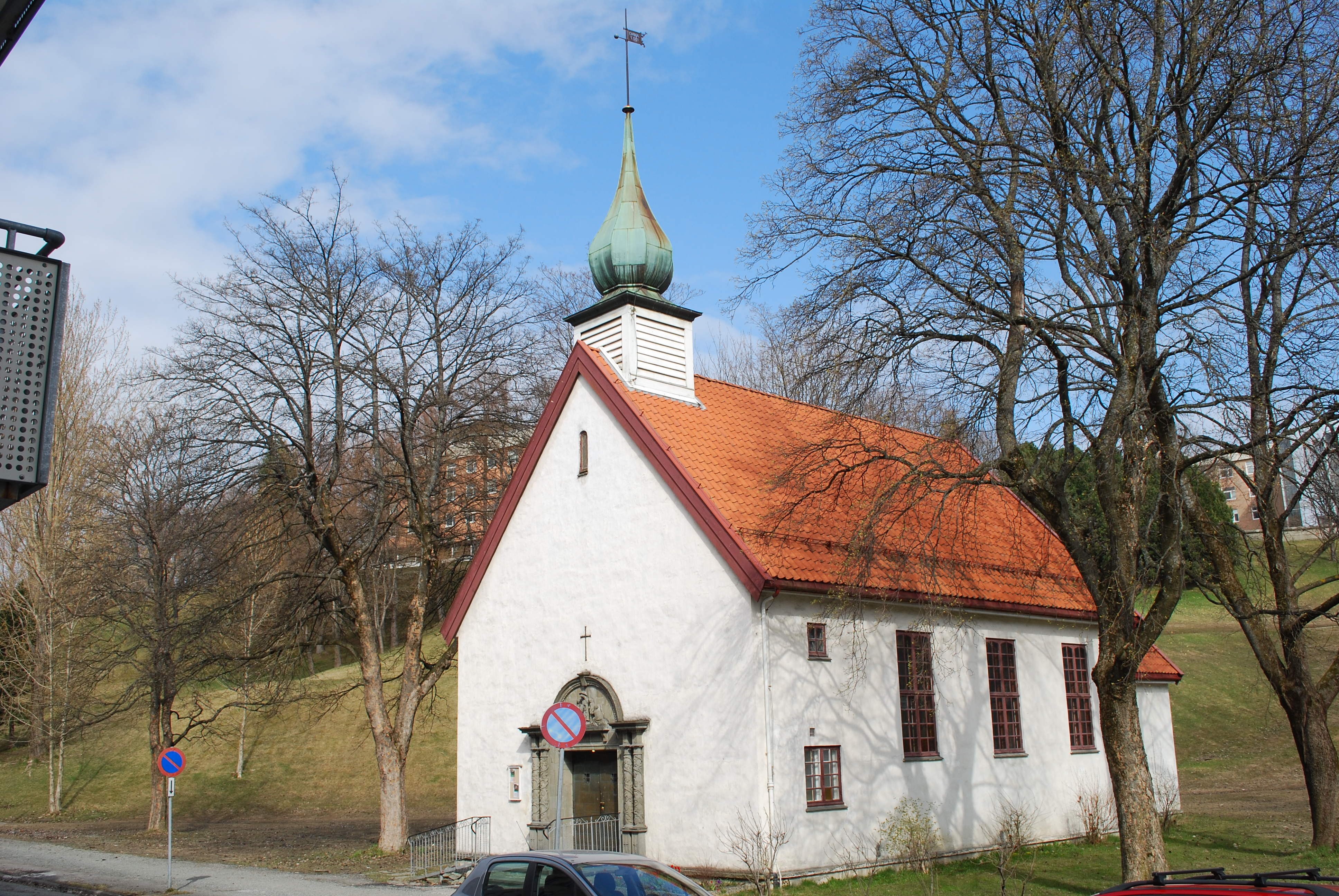 Døves kirke ved Klæbuveien i Trondheim.